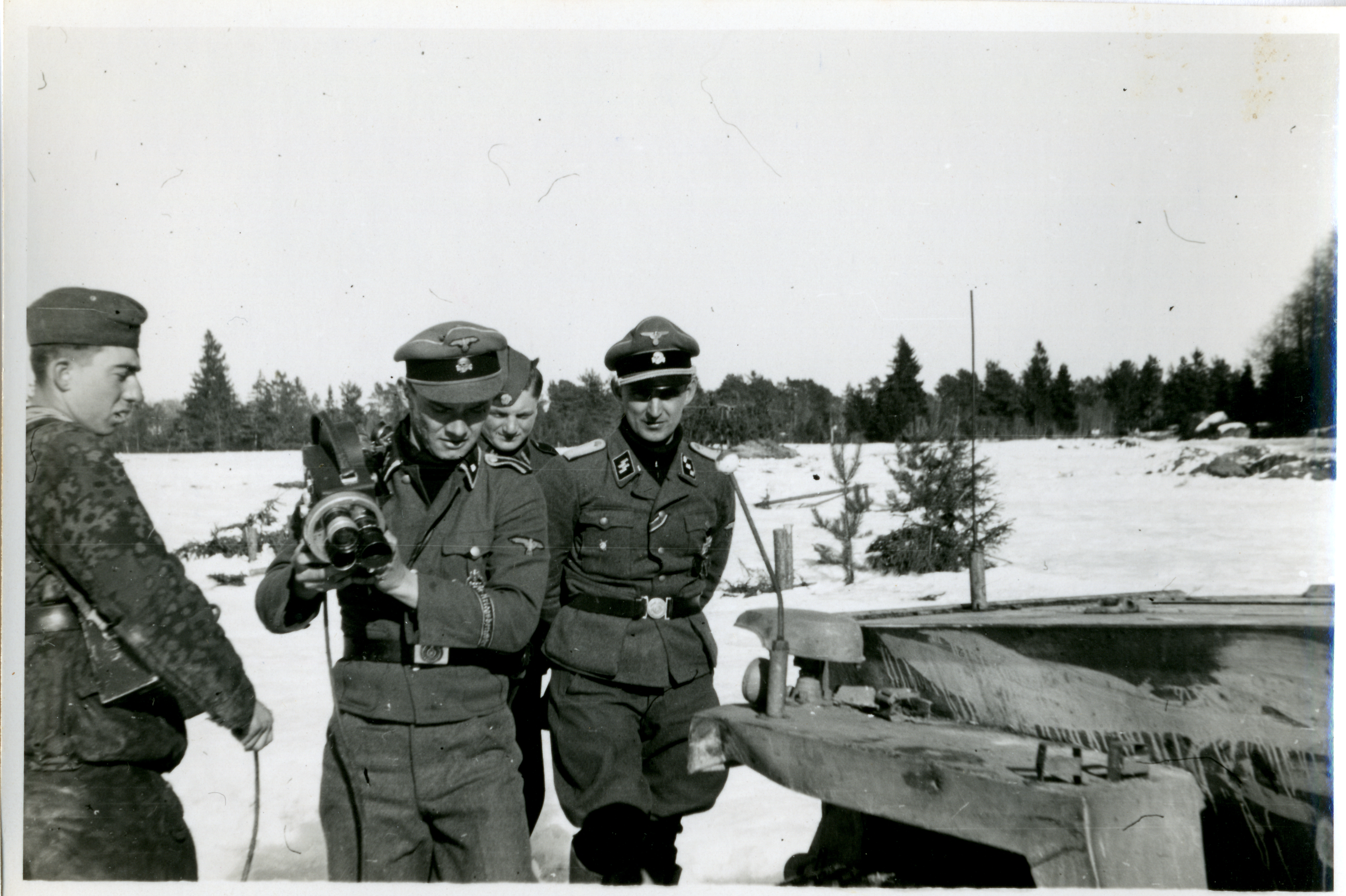 Bildet er hentet fra Arkivverket. Propagandaavdelingen besøker oppklaringsavdelingen til Divisjon Nordland. Den svenske offiseren Hans-Gösta Pehrsson til venstre. Foto fra Narvafronten, tilhørende landssviksak med domsnummer 2506, Oslo Politikammer. Arkivinstitusjon : Riksarkivet Arkivnavn : Landssvikarkivet Sted : Estland, Ukjent, Ukjent, Narva Emneord: 2. verdenskrig, Andre verdenskrig, Soldater, Frontkjempere, Menn, Narvafronten, Krig, Divisjon Nordland Avbildet